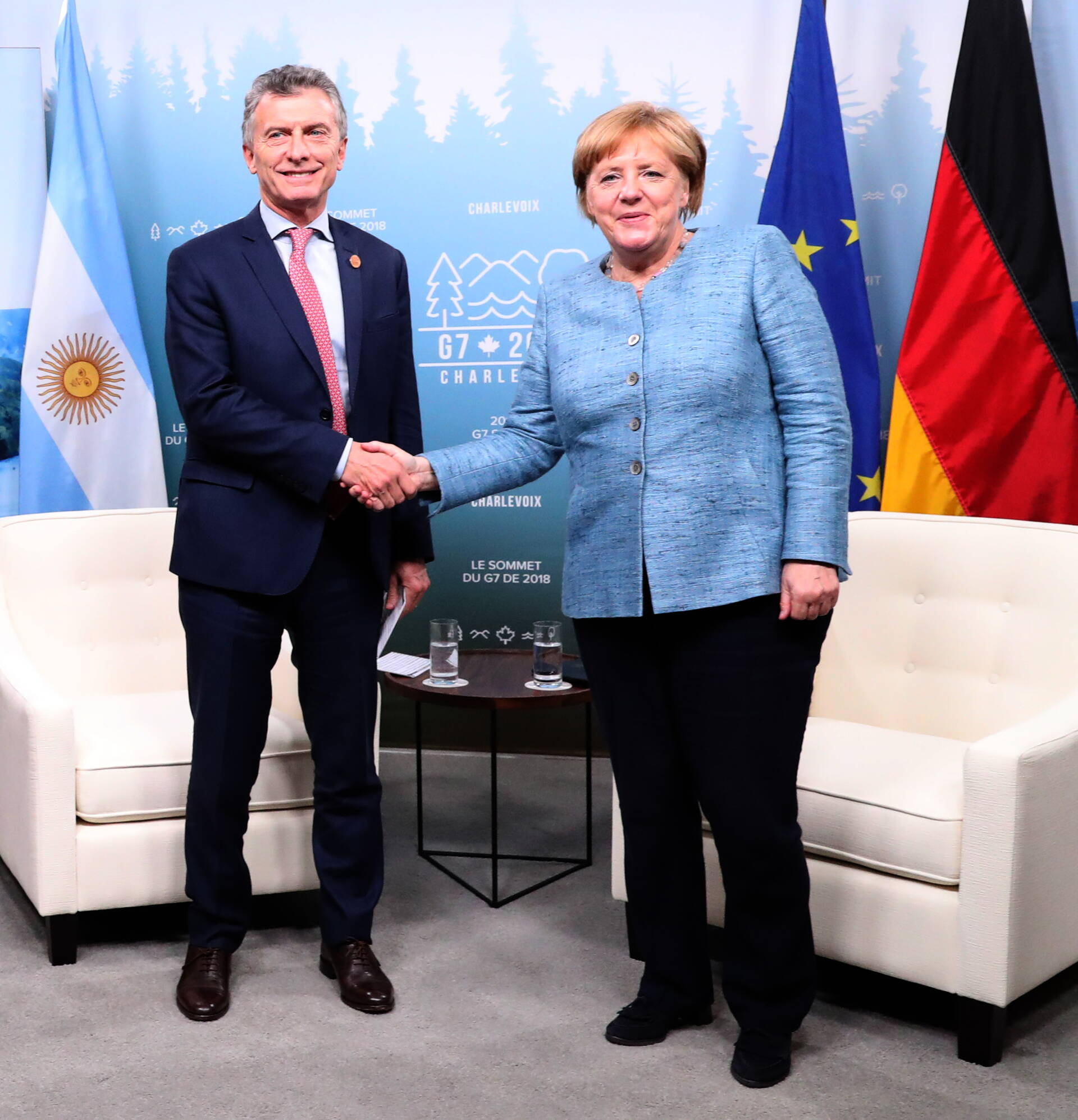 El presidente Mauricio Macri se reunió con la canciller de Alemania, Angela Merkel, y con la primera ministra del Reino Unido, Theresa May, en el marco de su participación en la Cumbre del G7, que se desarrolló en la localidad de Charlevoix, situada en la región de Quebec, en Canadá.